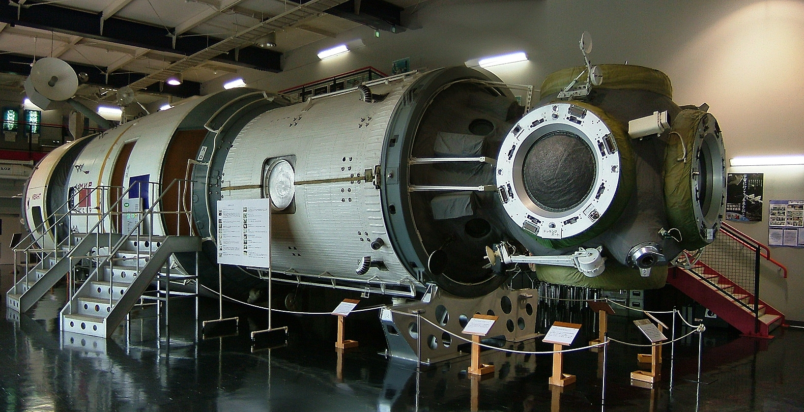 苫小牧市ミール展示館にあるミール（コアモジュール）とクバントの予備機